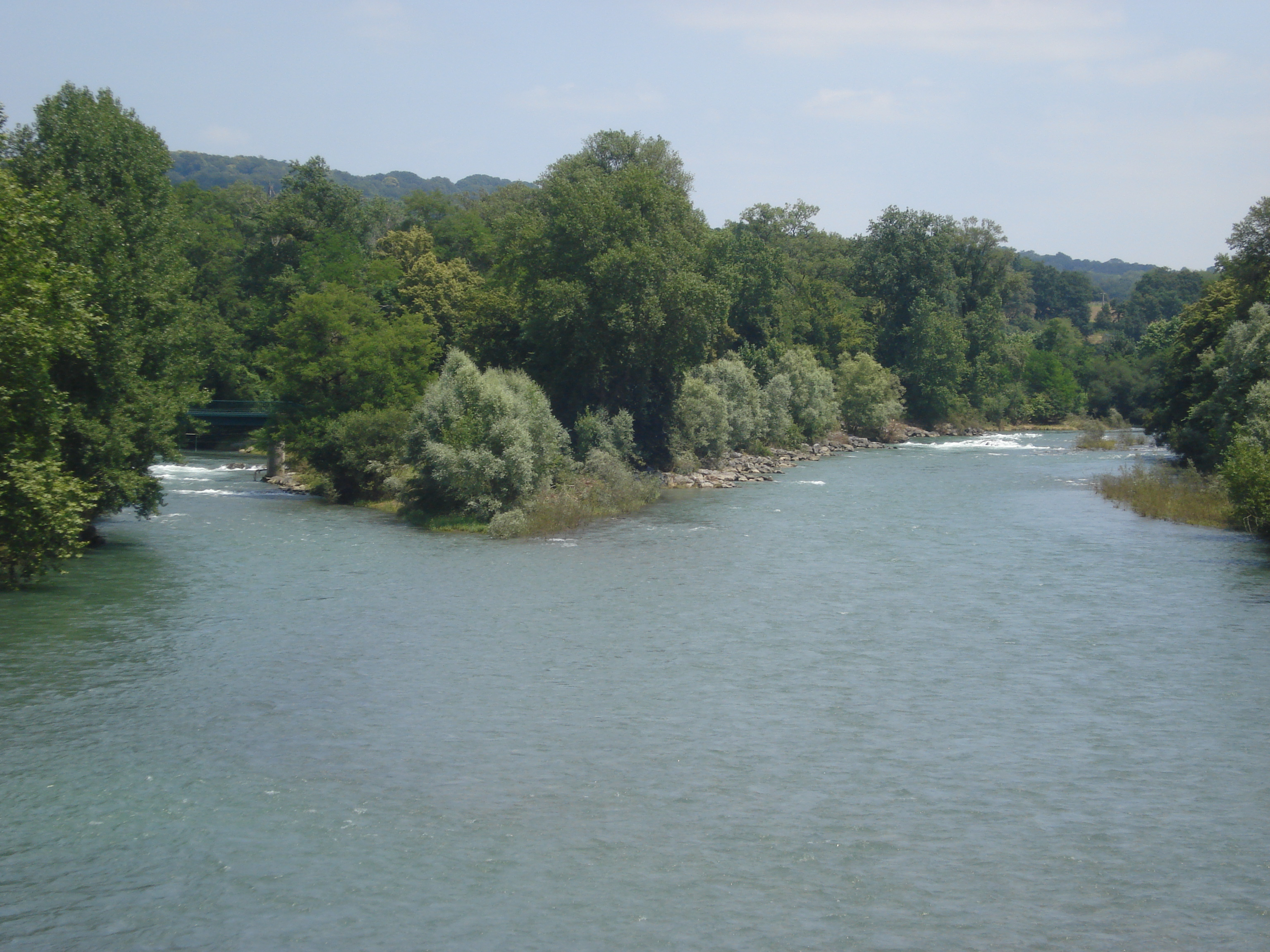 Embouchure Saison - Gave d'Oloron,Vue de L'île de la Glère à Sauveterre-de-Béarn, Pyrenées-Atlantiques, France. Il s'agit de la confluence du bras annexe (provenant de l'île de la Glère à Sauveterre de Béarn) et du bras principal du Gave d'Oloron depuis le pont en aval de cette île.